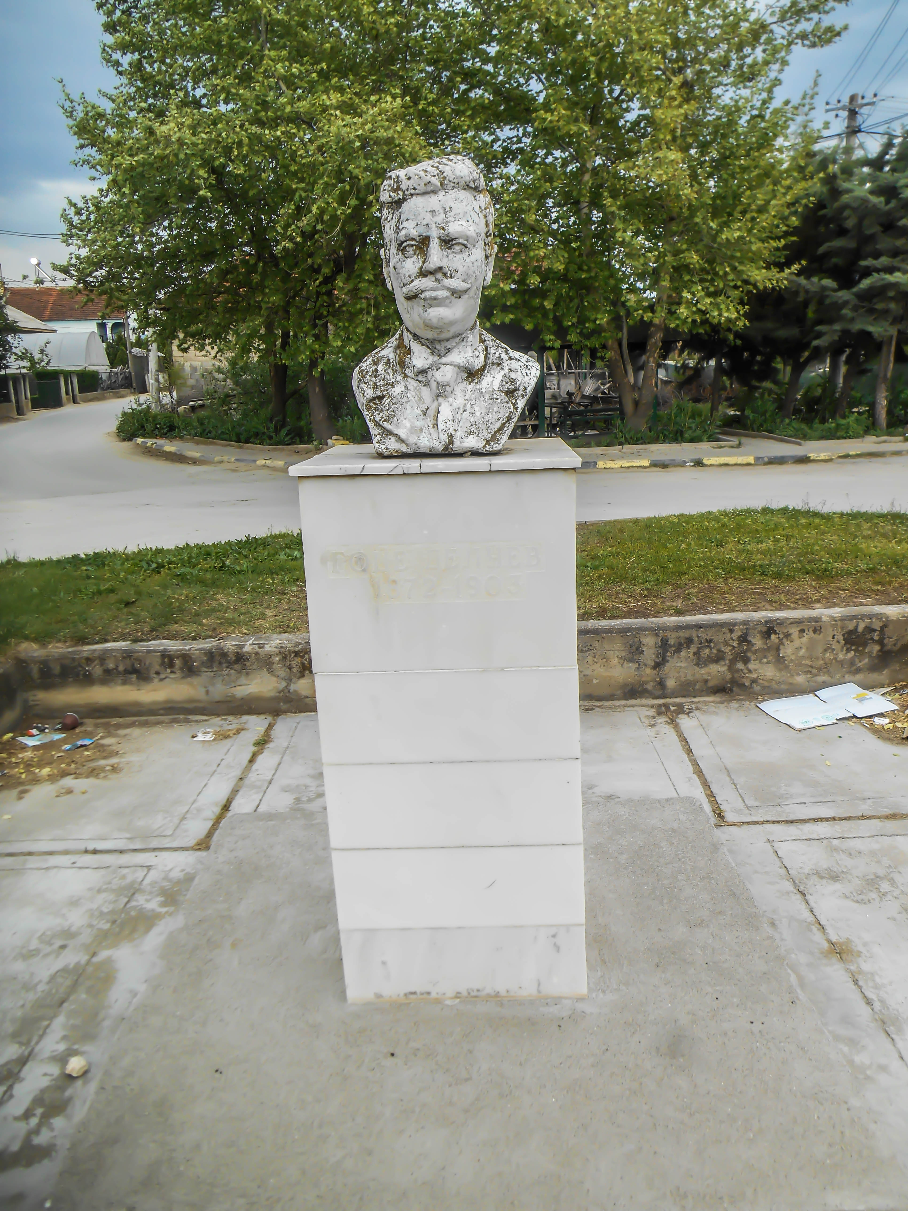 Статуа на Гоце Делчев - Моноспитово